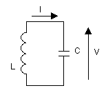 Simple LC circuit. 2006